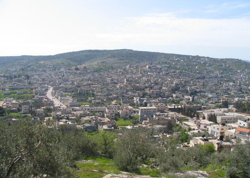 قباطية - صورة عامة لبيوت البلدة